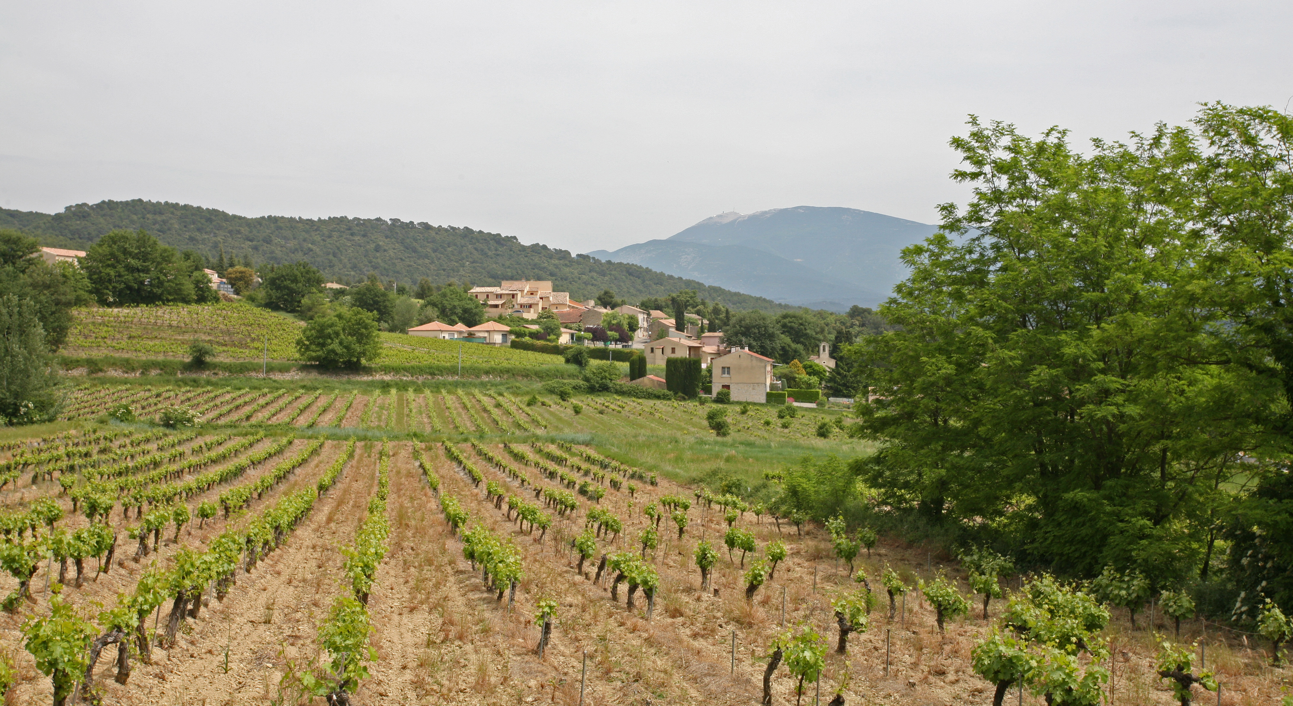 Saint-Marcellin-lès-Vaison (commune de Vaucluse) avec en fond le Mont Ventoux